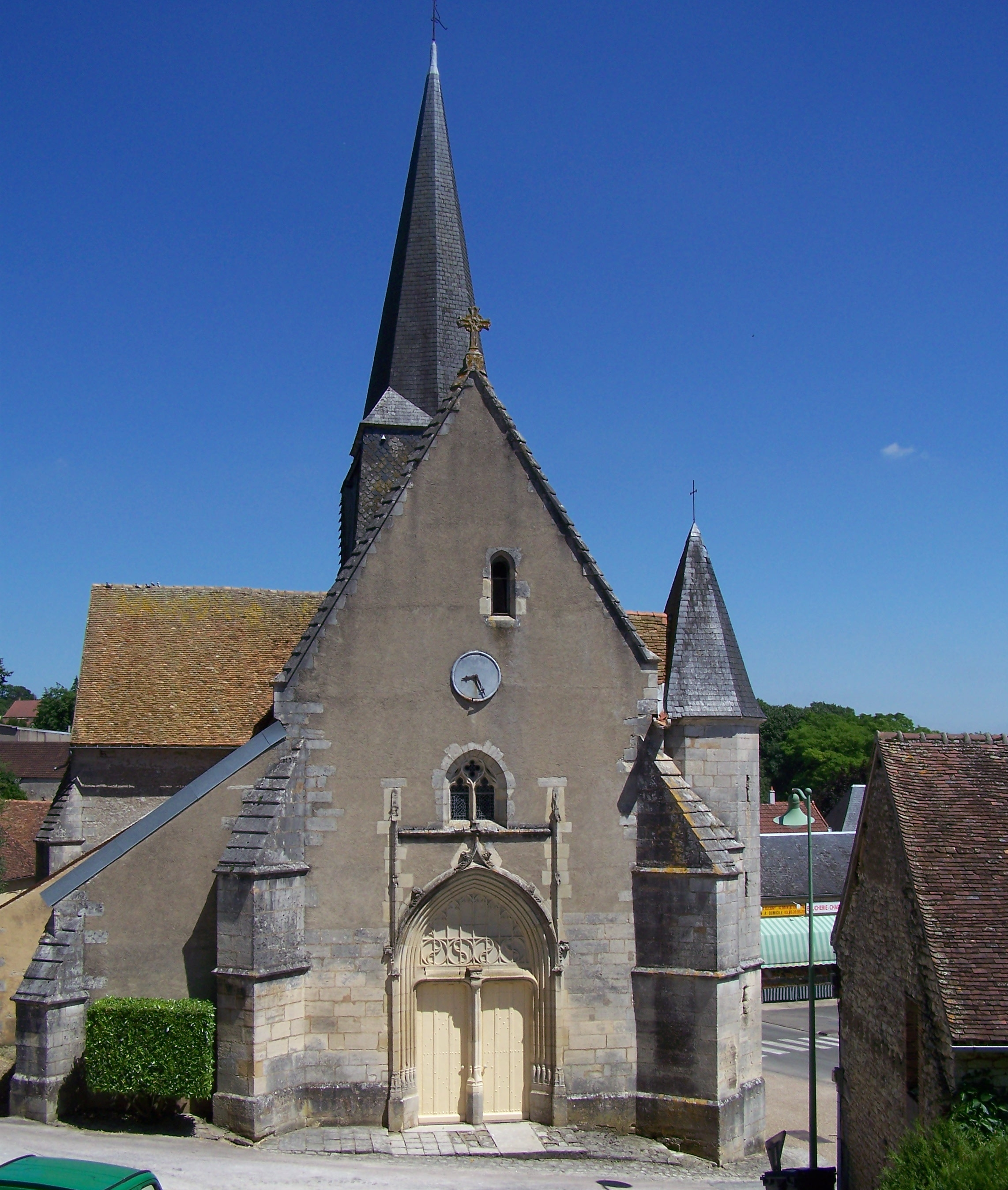 Église de la commune d'Alligny-Cosne (Nièvre, Bourgogne, France)